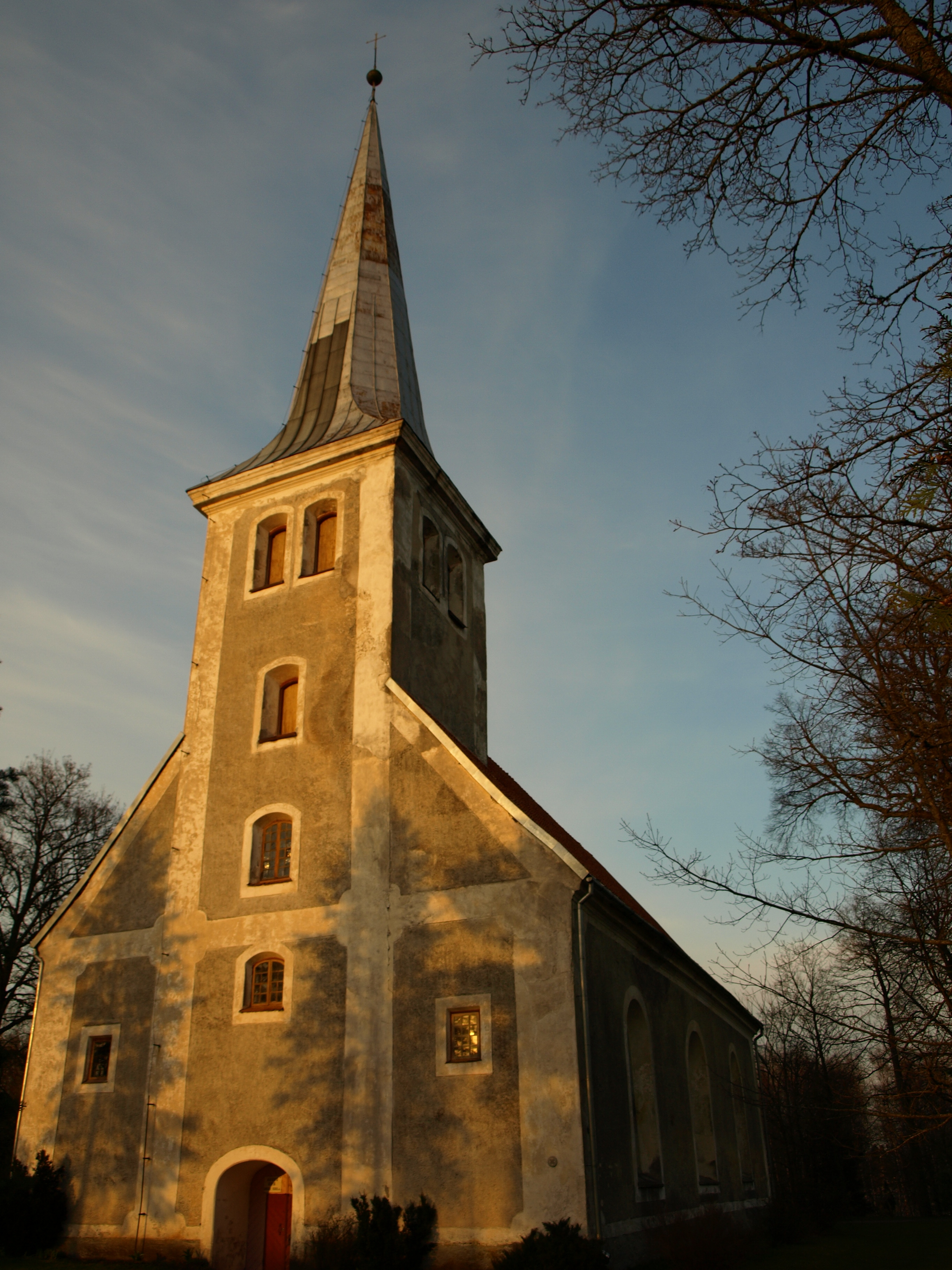 Audru kirik